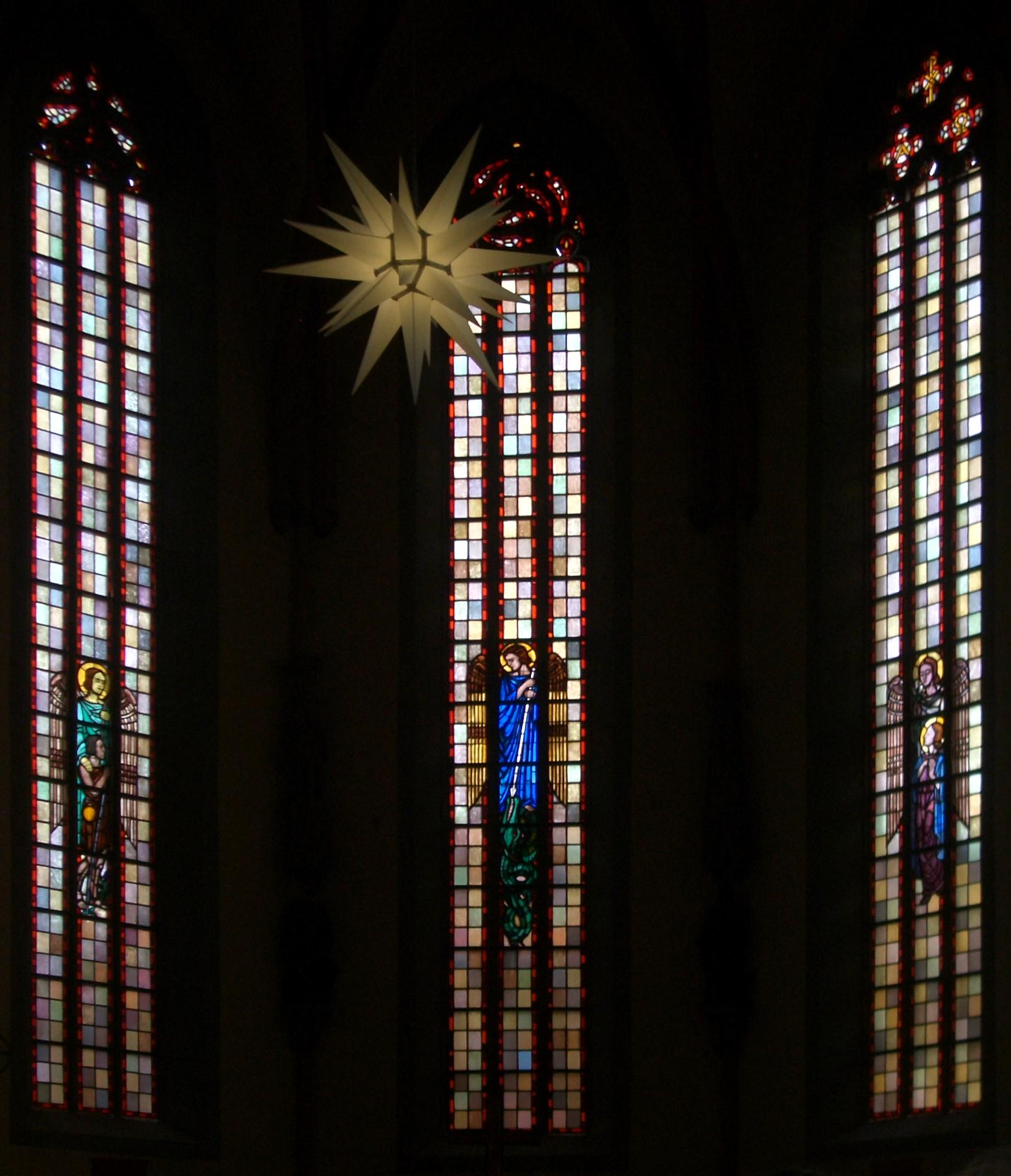 Glaskunstfenster von Fritz Körner (Weimar 1956) in der Stadtkirche St. Michael (Jena) mit den Erzengeln Michael (M., mit Lanze und Drachen), Raphael (l., mit Tobias) und Gabriel (r., mit Maria)